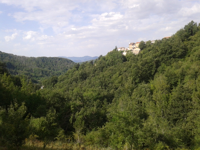 Foto panoramica di Tufo Alto